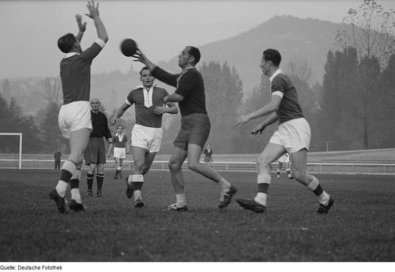 Original image description from the Deutsche Fotothek Handballspieler bei einem Spiel auf dem Feld